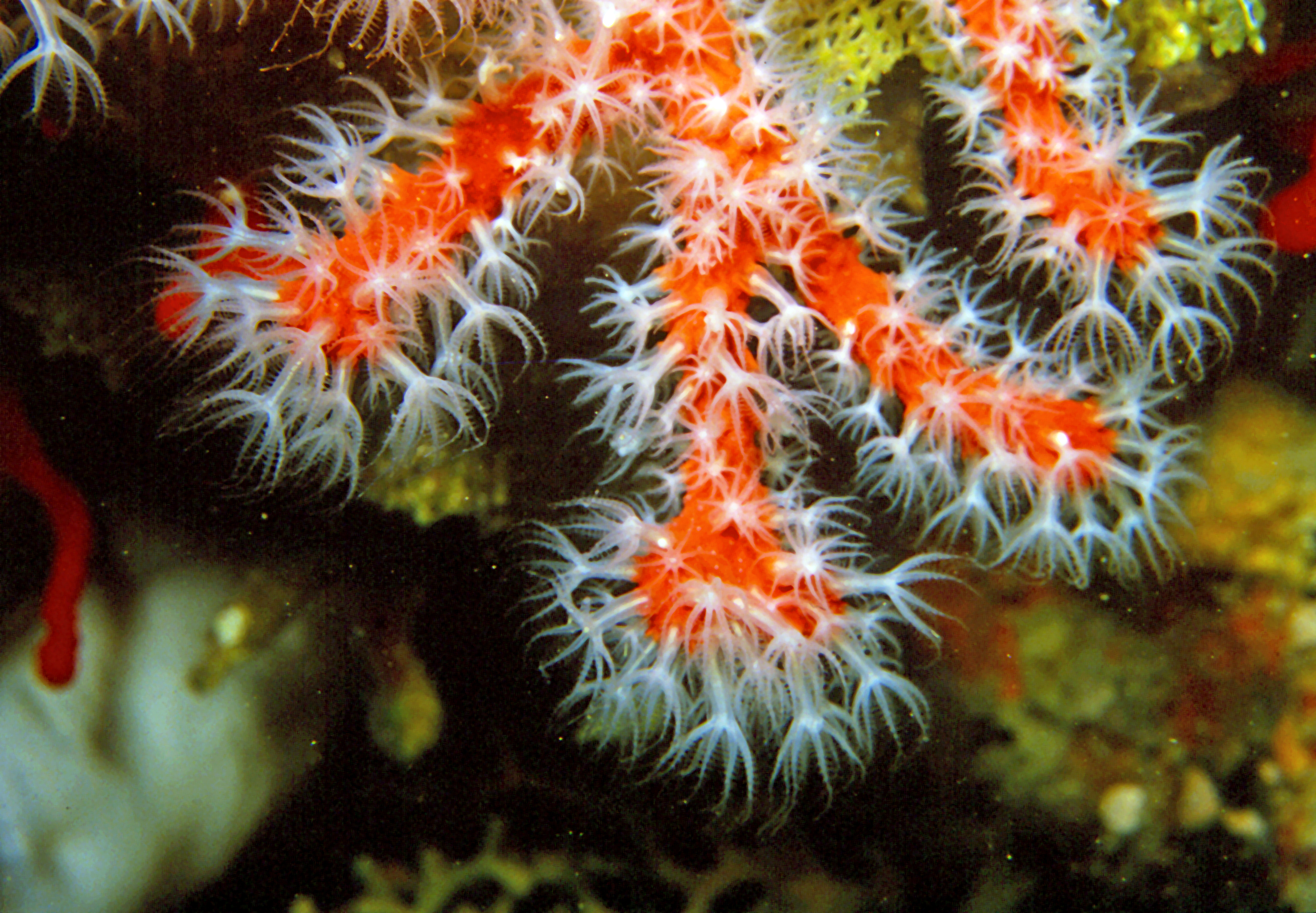 Corallium rubrum (Linnaeus, 1758) - Banyuls-sur-Mer, Sec de Rédéris : 08/84